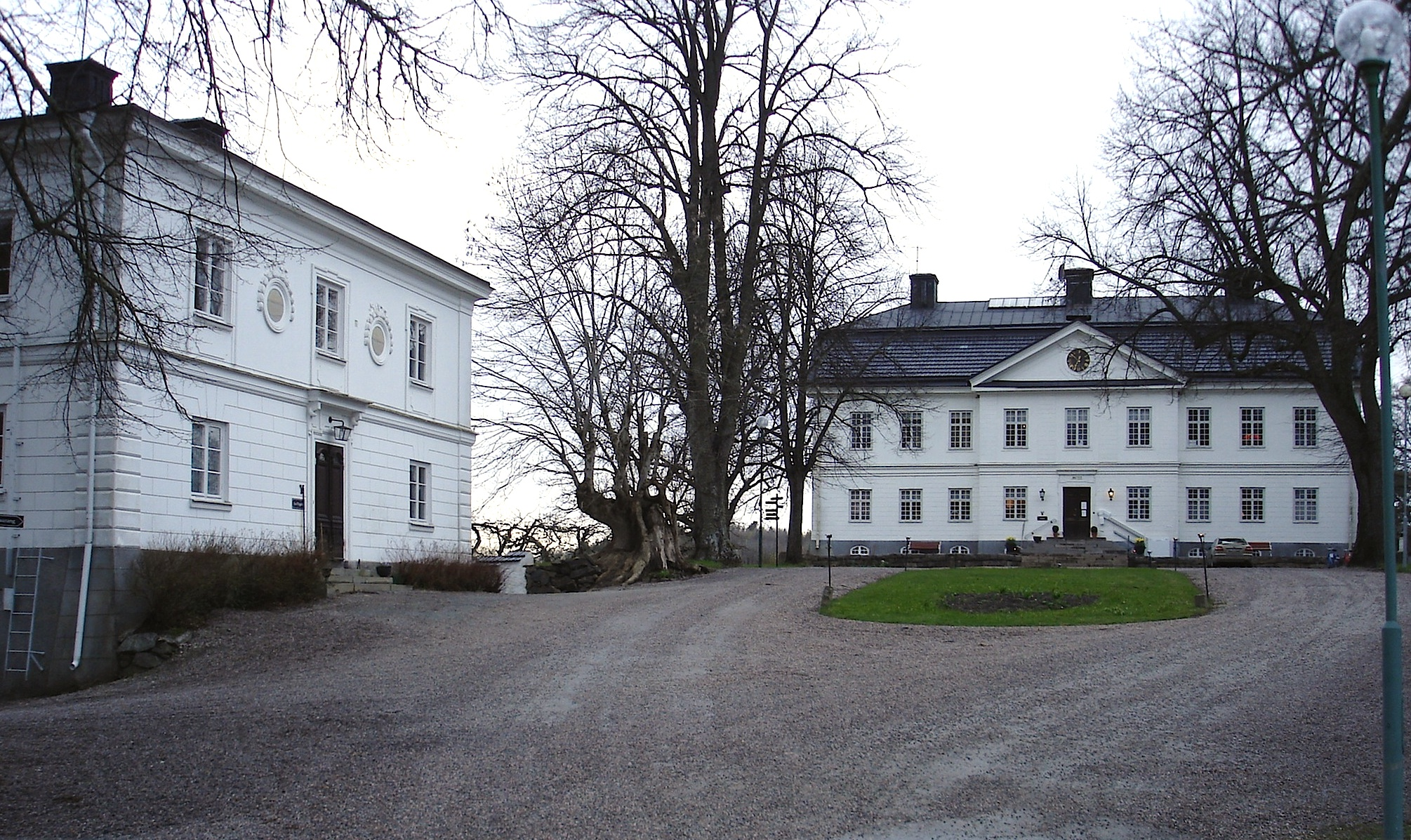 Yxtaholms slott Södermanland